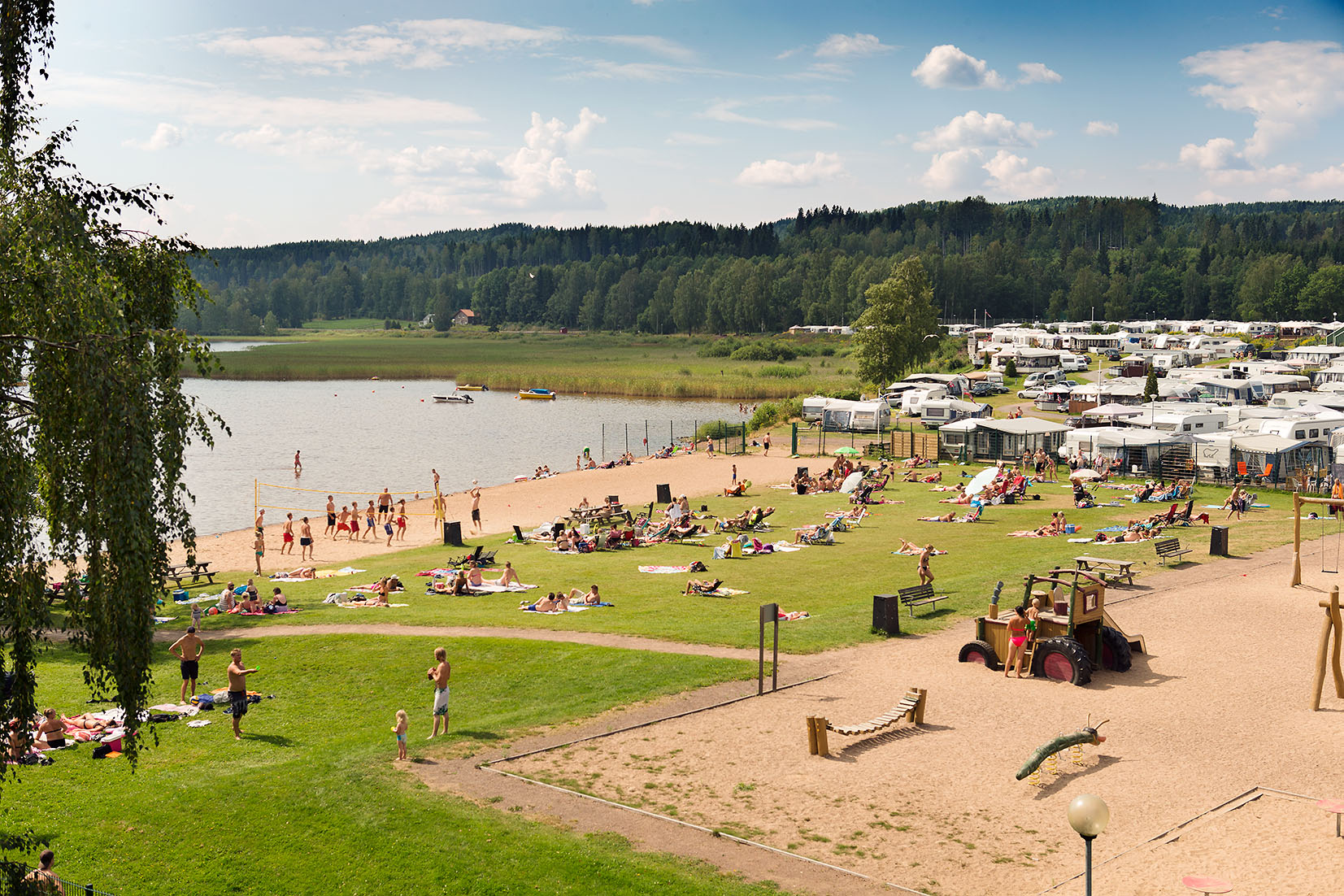 Badstrand på Kolsnäs.